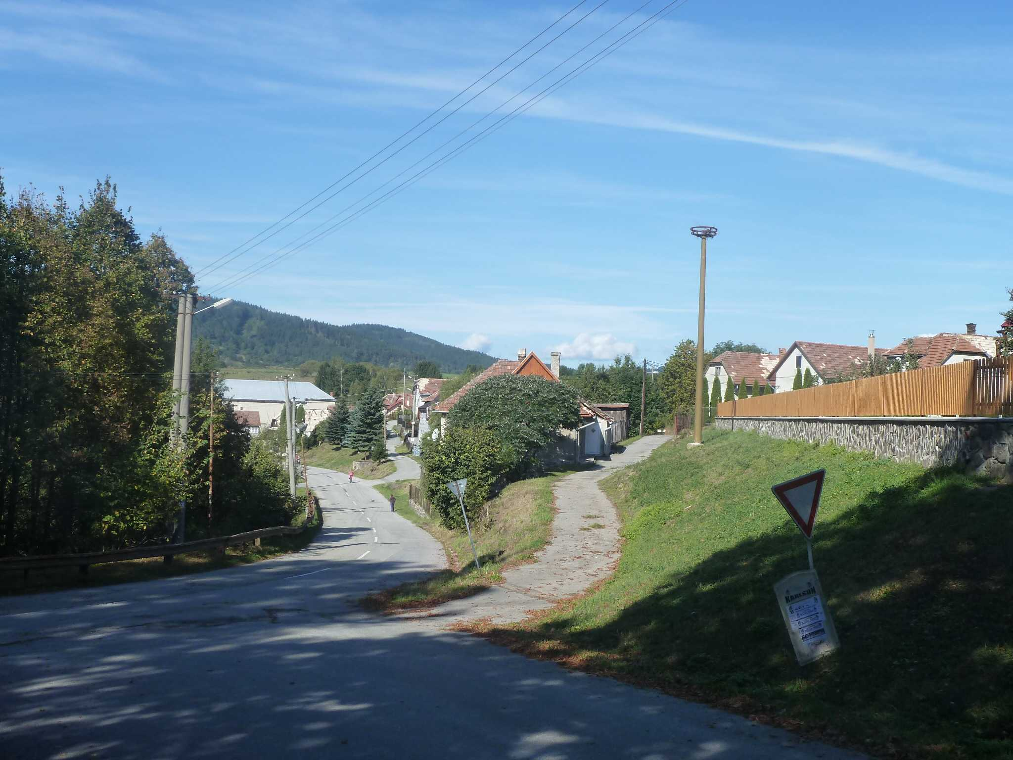 Obec Sklené, pohľad od kostola